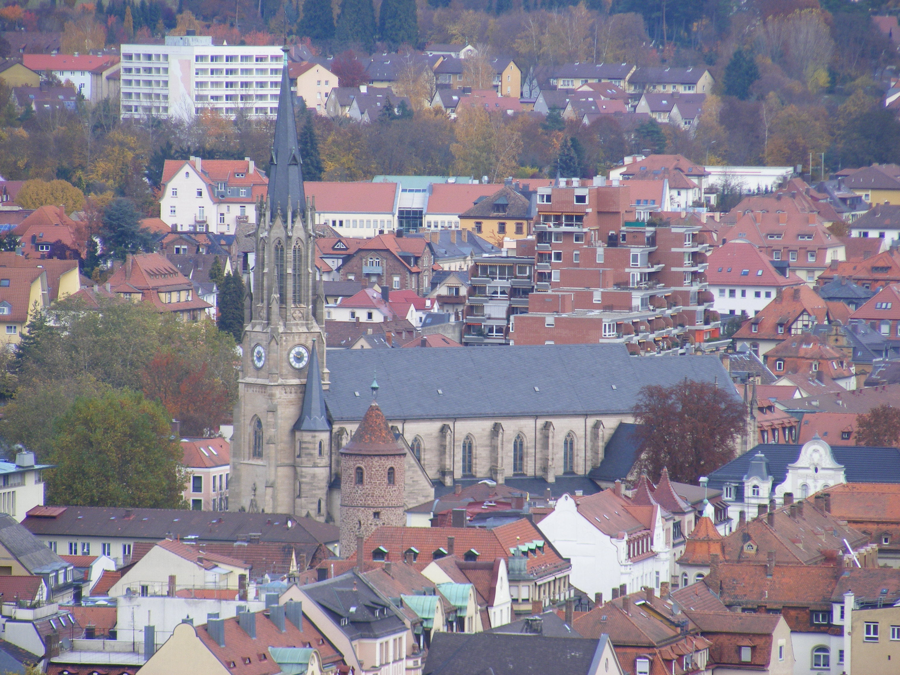 Bad Kissingen - Herz-Jesu-Kirche (vom Altenberg gesehen).